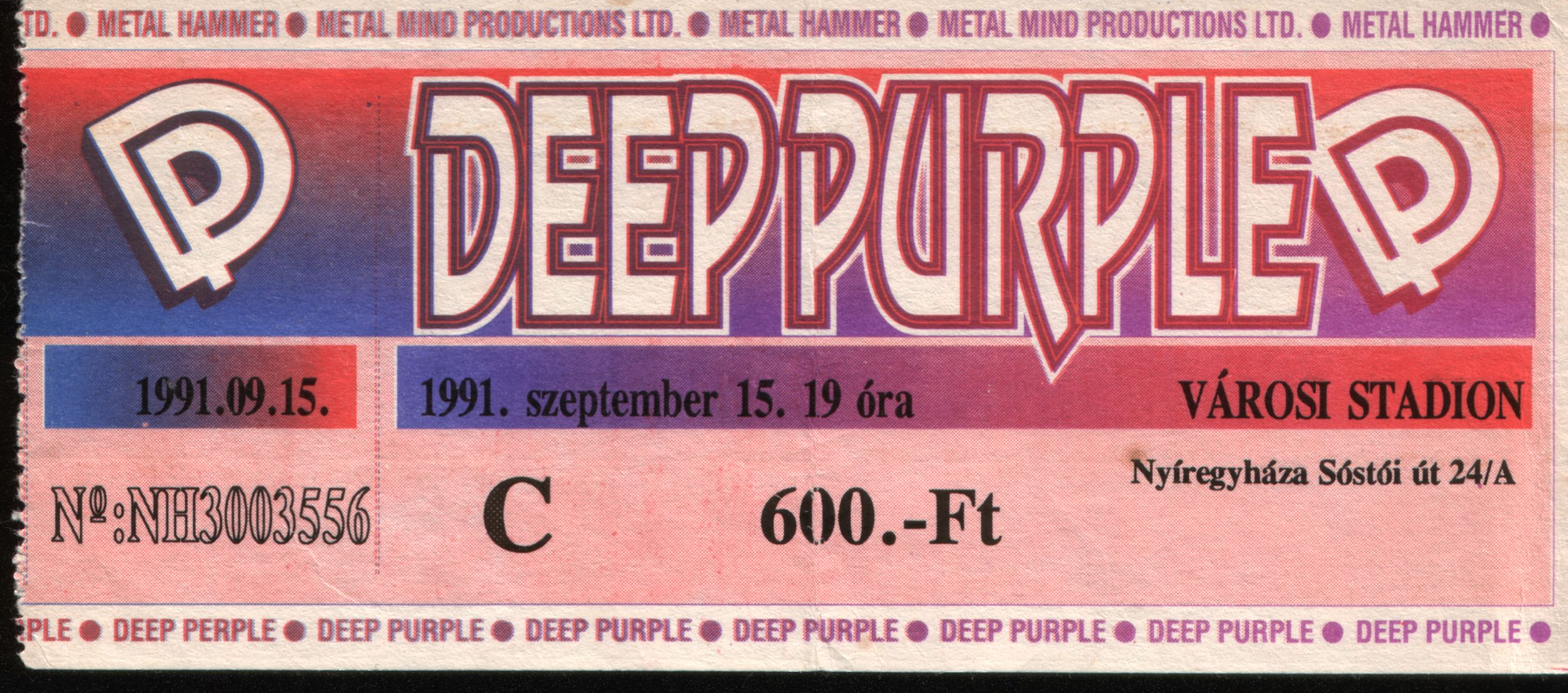 A Deep Purple Magyarországon, Nyíregyházán a Városi Stadionban rendezett koncert belépőjegye 1991.09.15